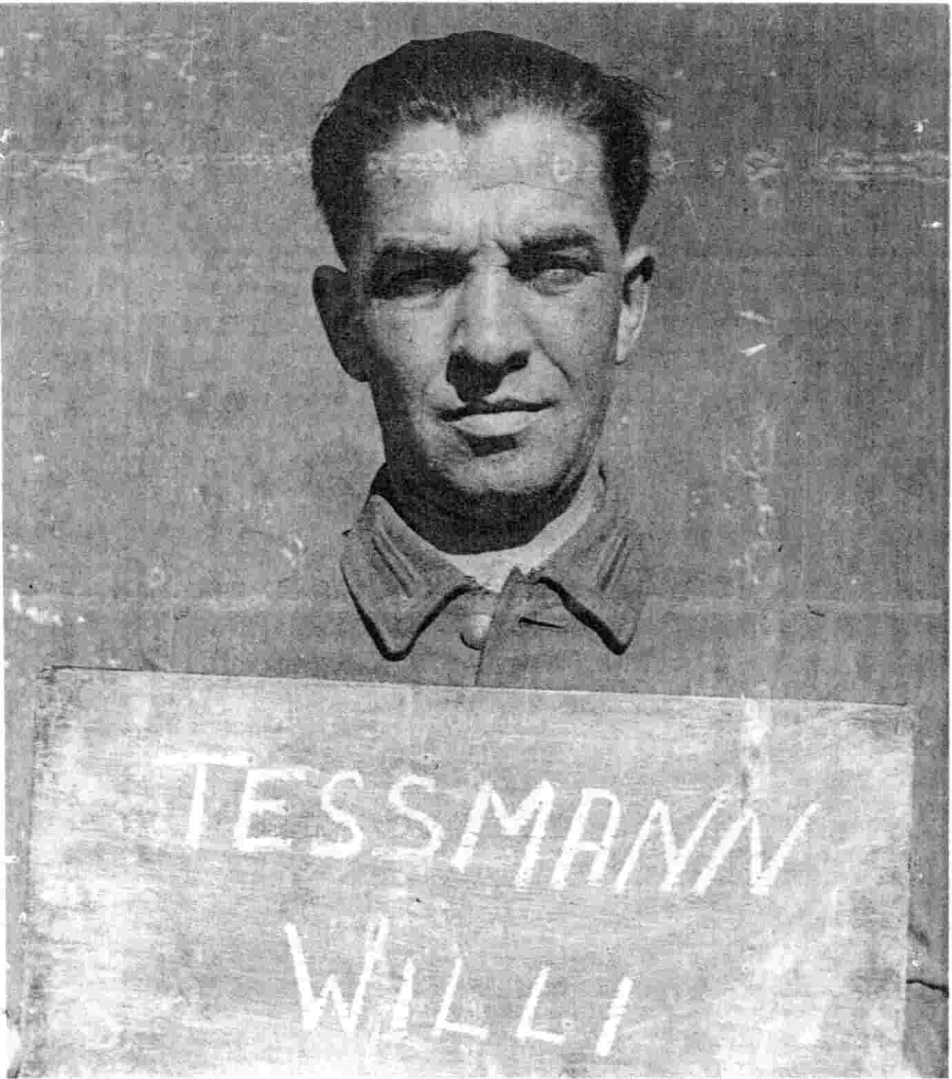 Willi Tessmann, Lagerkommandant in Fuhlsbüttel